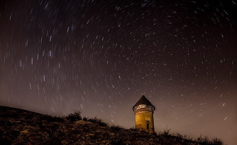 مازِرونی: رسکت برج که ساری ِجنوبی مله ئون دله دره.